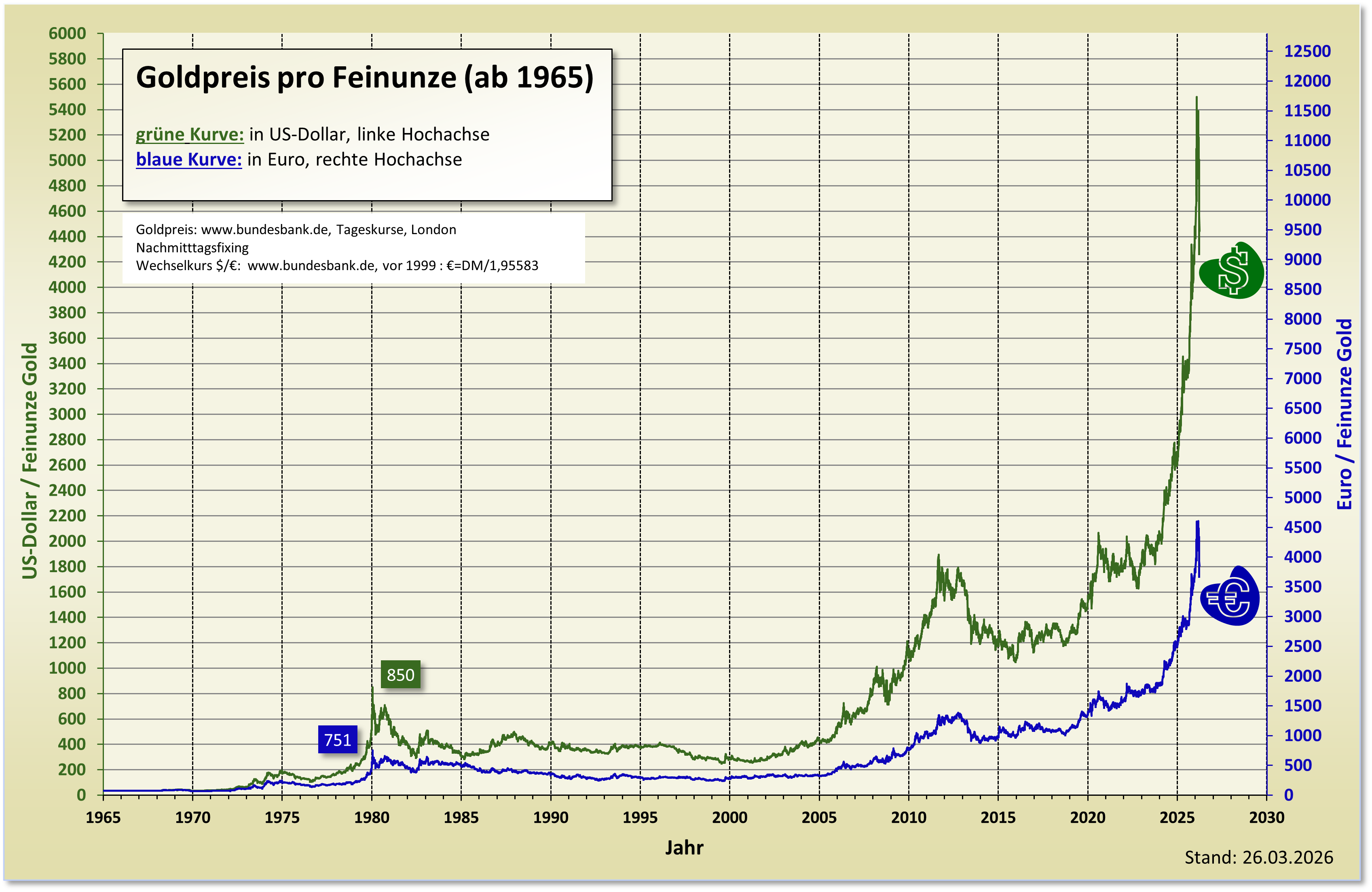 Historischer Goldpreis in Dollar (US$) und Euro (€)